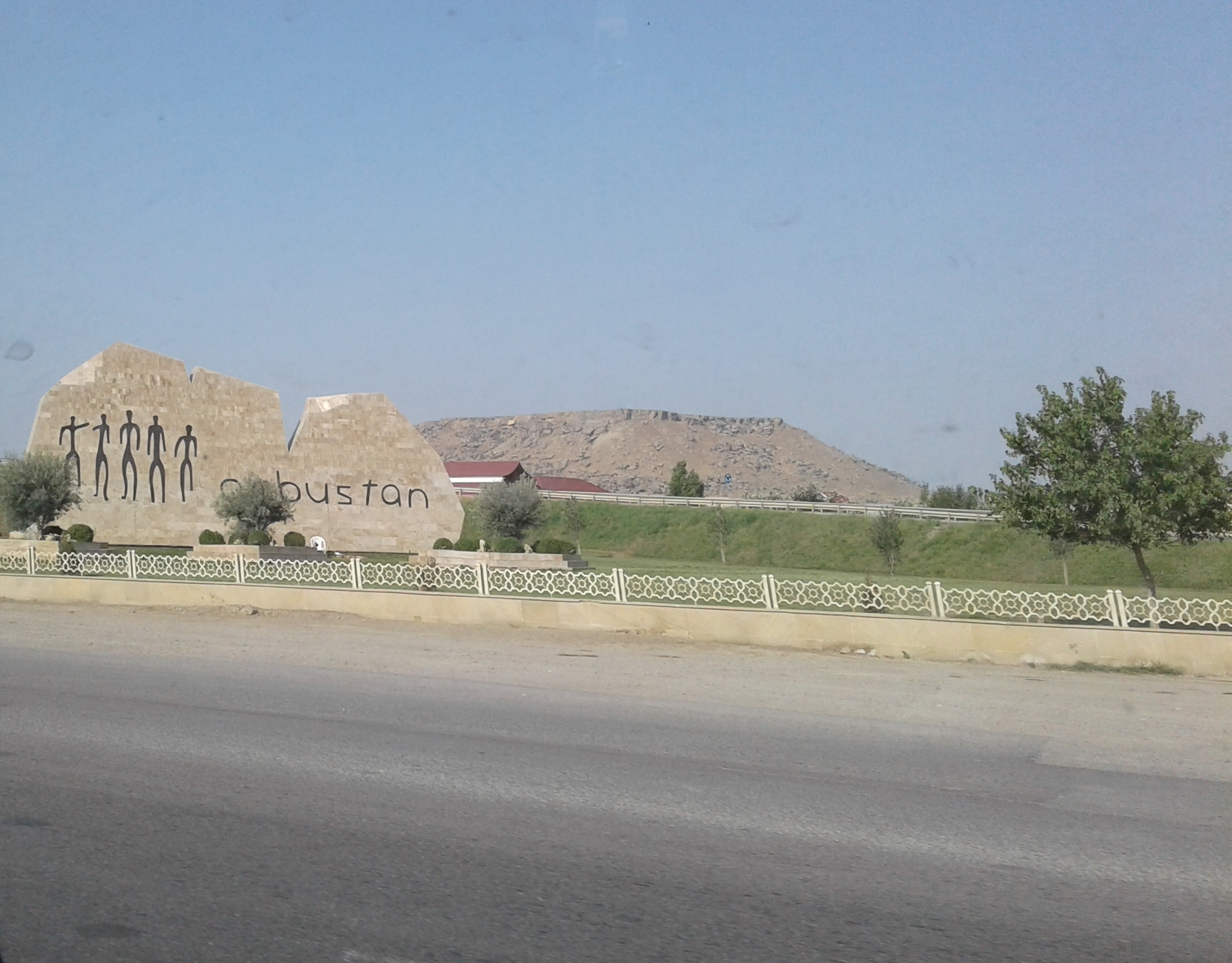 поселок Кобустан